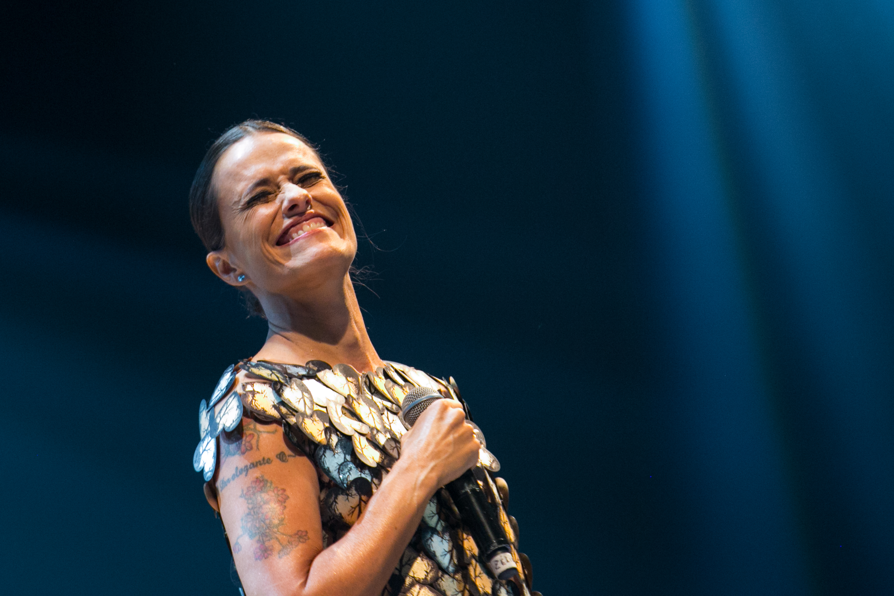 Zélia Duncan, cantora e compositora brasileira na TURNÊ DO 26º PRÊMIO DA MÚSICA BRASILEIRA.